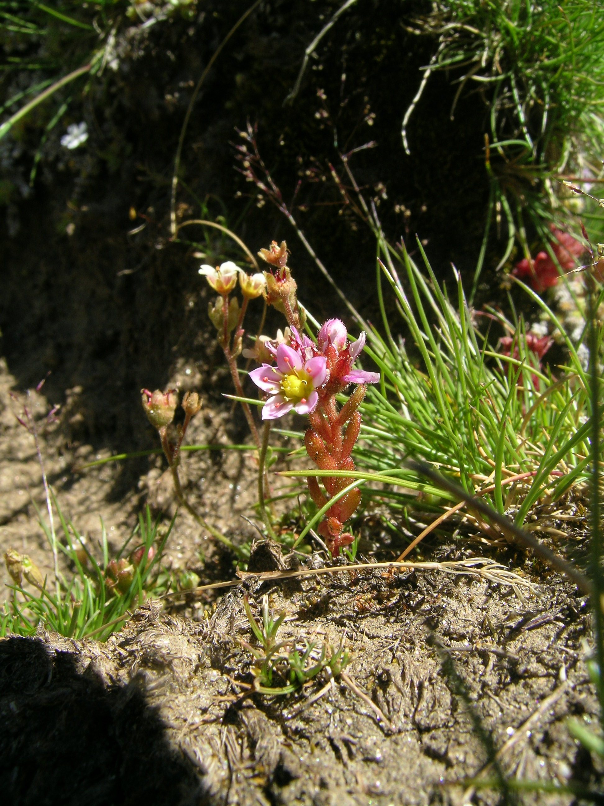 Sedum villosum, Gornergrat, "Stiermur", Kanton Wallis, Schweiz (2650 m.a.s)